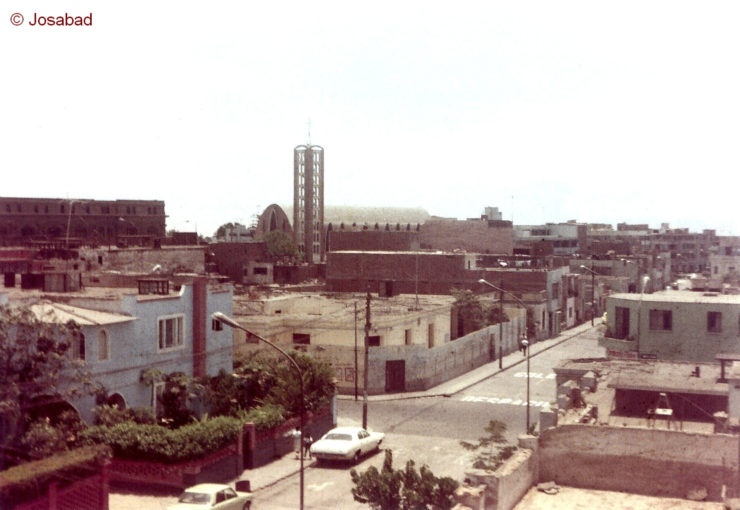 Vista de la cuarta y quinta cuadra de la Avenida República de Portugal. Fotografía tomada en 1982.